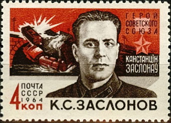 Почтовая марка СССР - Заслонов Константин Сергеевич, Герой Советского Союза